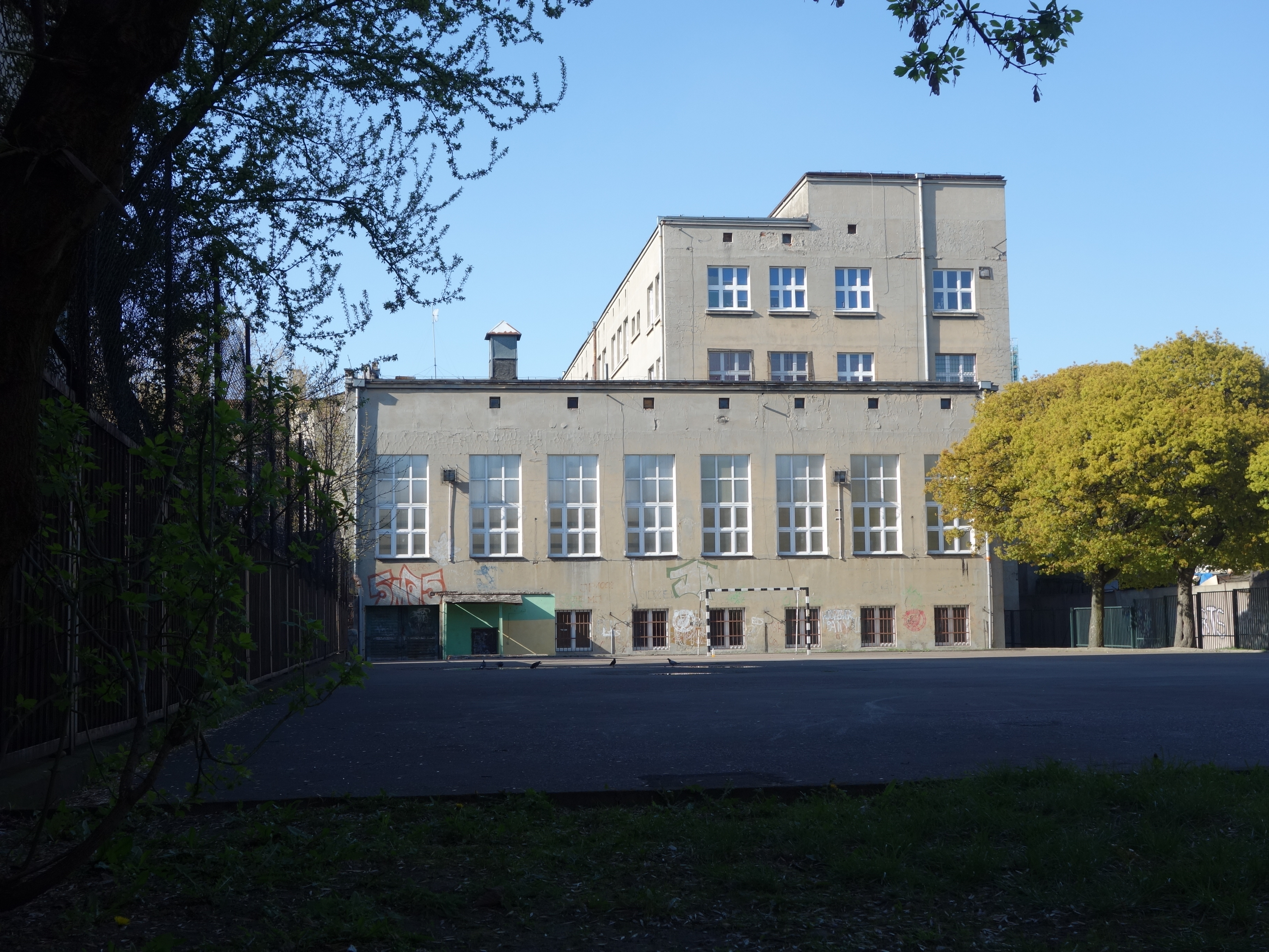 Grundschule (Szkoła Podstawowa) Nr. 4 der Stadt Łódź in der heutigen Aleja Józefa Piłsudskiego 101 (Piłsudski-Allee); das Gebäude (hier die Ansicht von Süden mit der Turnhalle) beherbergte während der deutschen Besatzung von 1941 bis 1944 die Günther-Prien-Schule (anfangs als Staatliche Oberschule für Jungen II bezeichnet); die Adresse lautete damals Ostlandstraße 191.